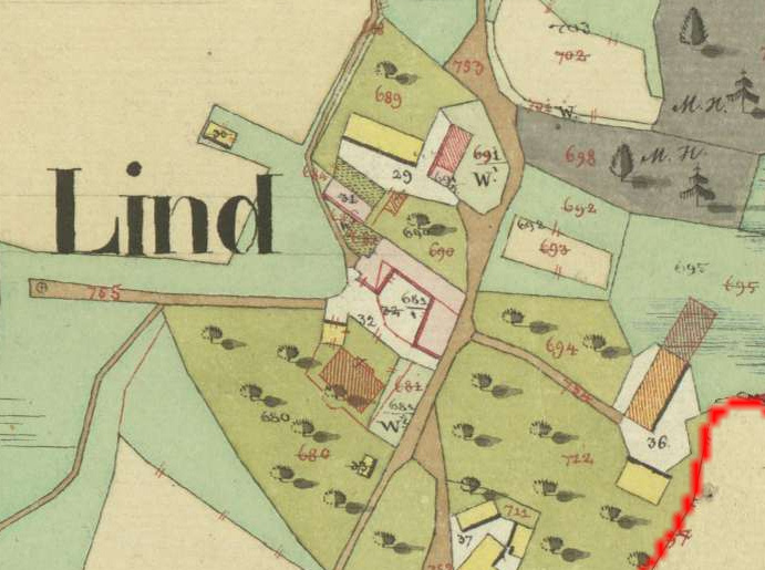 Abbildung des Schlosses Riedenberg (seinerzeit noch Lind genannt) im Franziszeischen Kataster